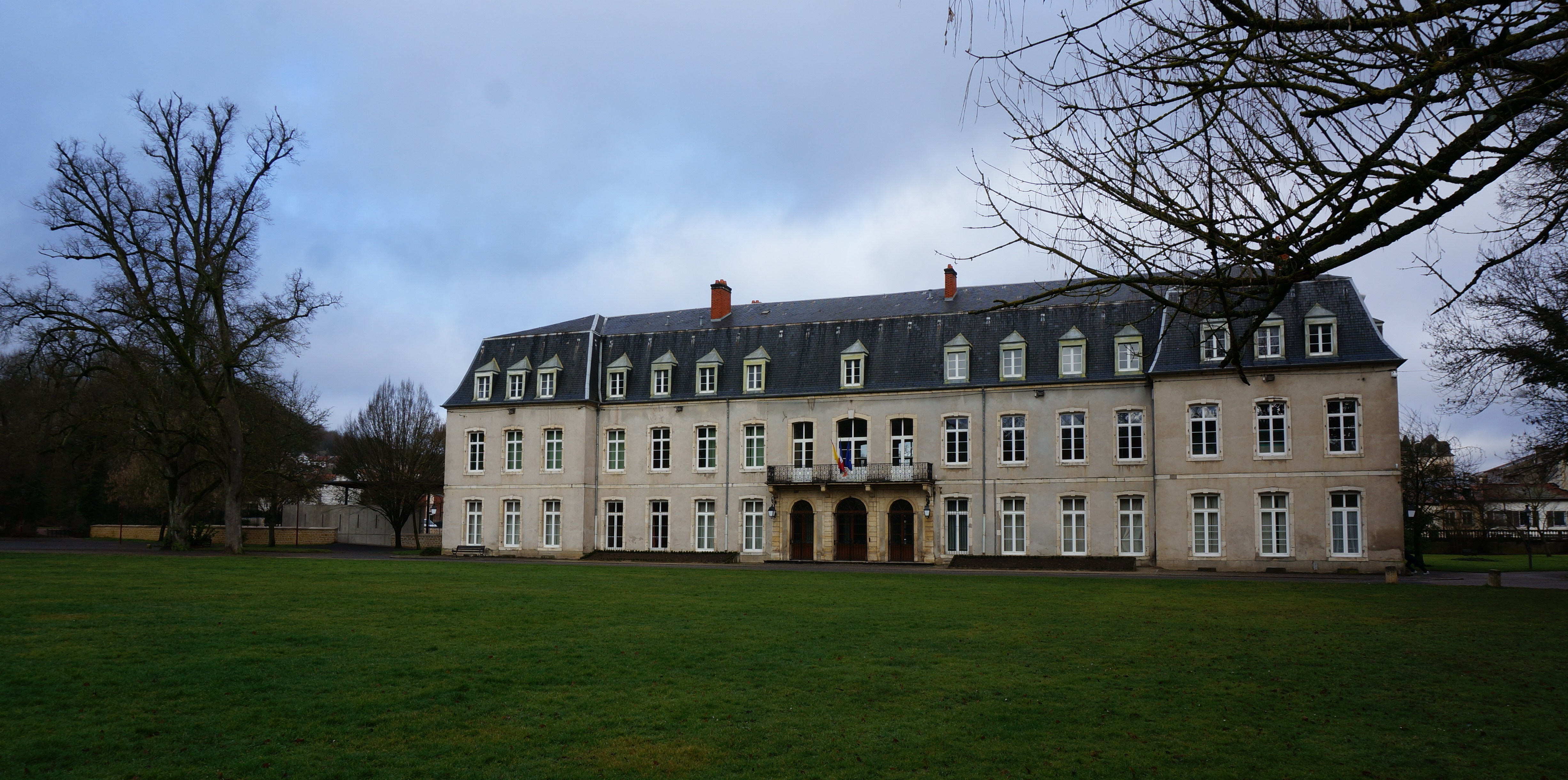 VUe du Château du bas .